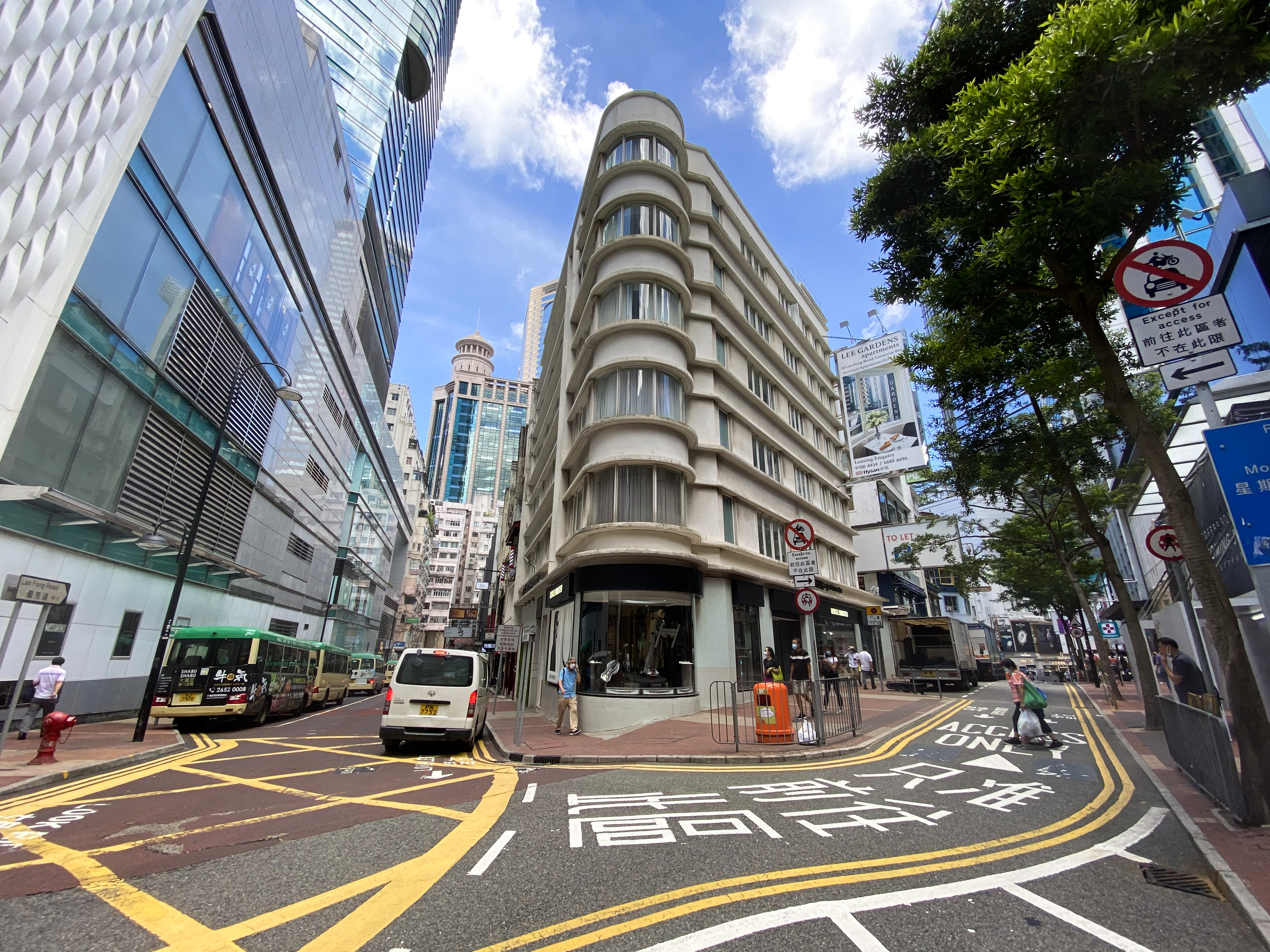 Lan Fong Road and Yun Ping Road